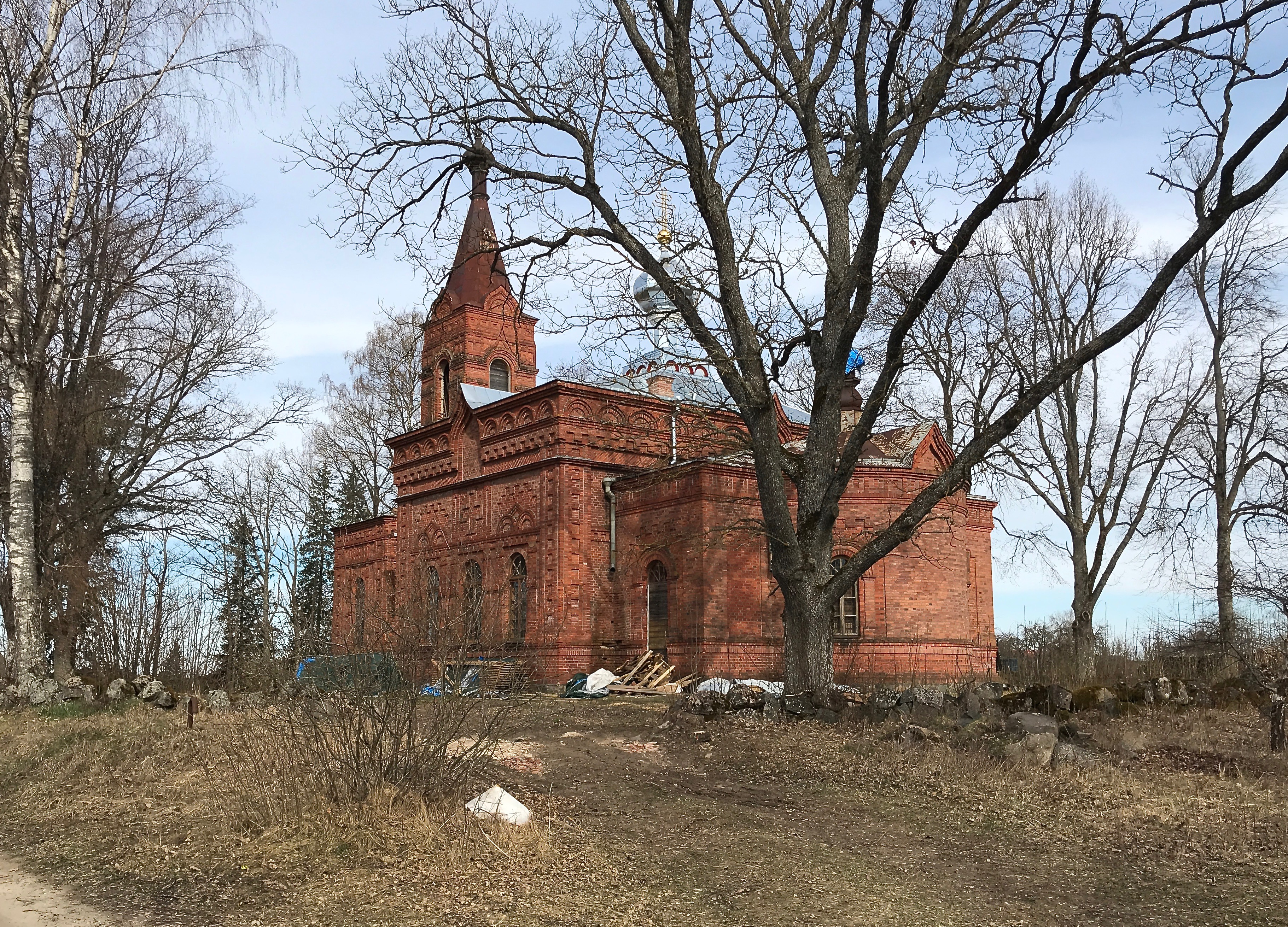 Suure-Jaani Peetruse ja Pauluse kirik (2019)